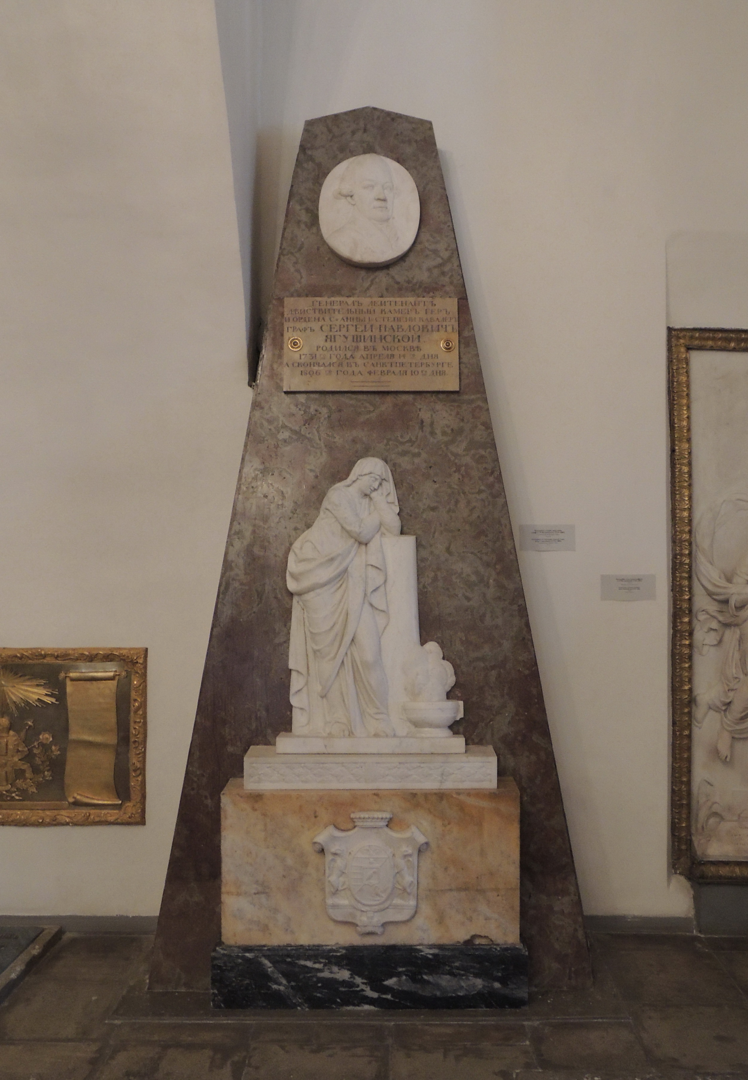 Ягужинский Сергей Павлович 1731-1806 Россия. Санкт-Петербург. Благовещенская усыпальница. Граф, генерал-лейтенант. Сын графа П.И. Ягужинского. Мраморный пристенный памятник с портретом. Скульптор Ф.Ф. Щедрин (?), 1810-е гг.